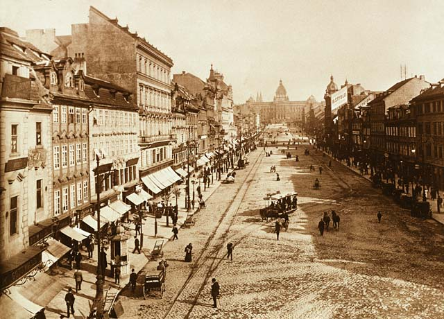 Václavské náměstí s novou dominantou budovy Národního muzea již vykročilo na cestu radikální proměny z ospalého tržiště v živý střed města.